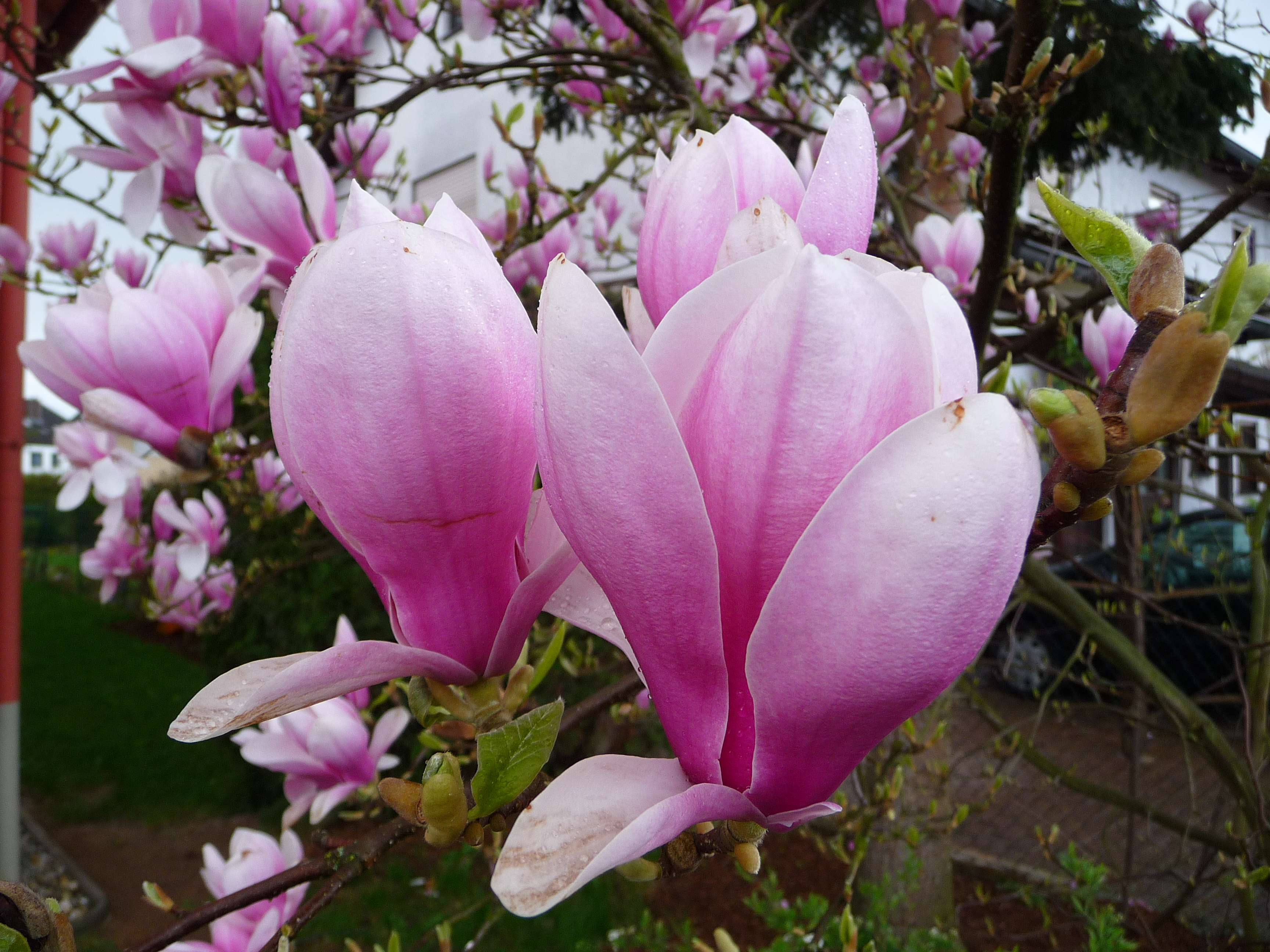 Nahaufnahme einer Tulpen-Magnolienblüte (Magnolia × soulangeana), fotografiert in Nordbaden (Baden-Württemberg, Deutschland)